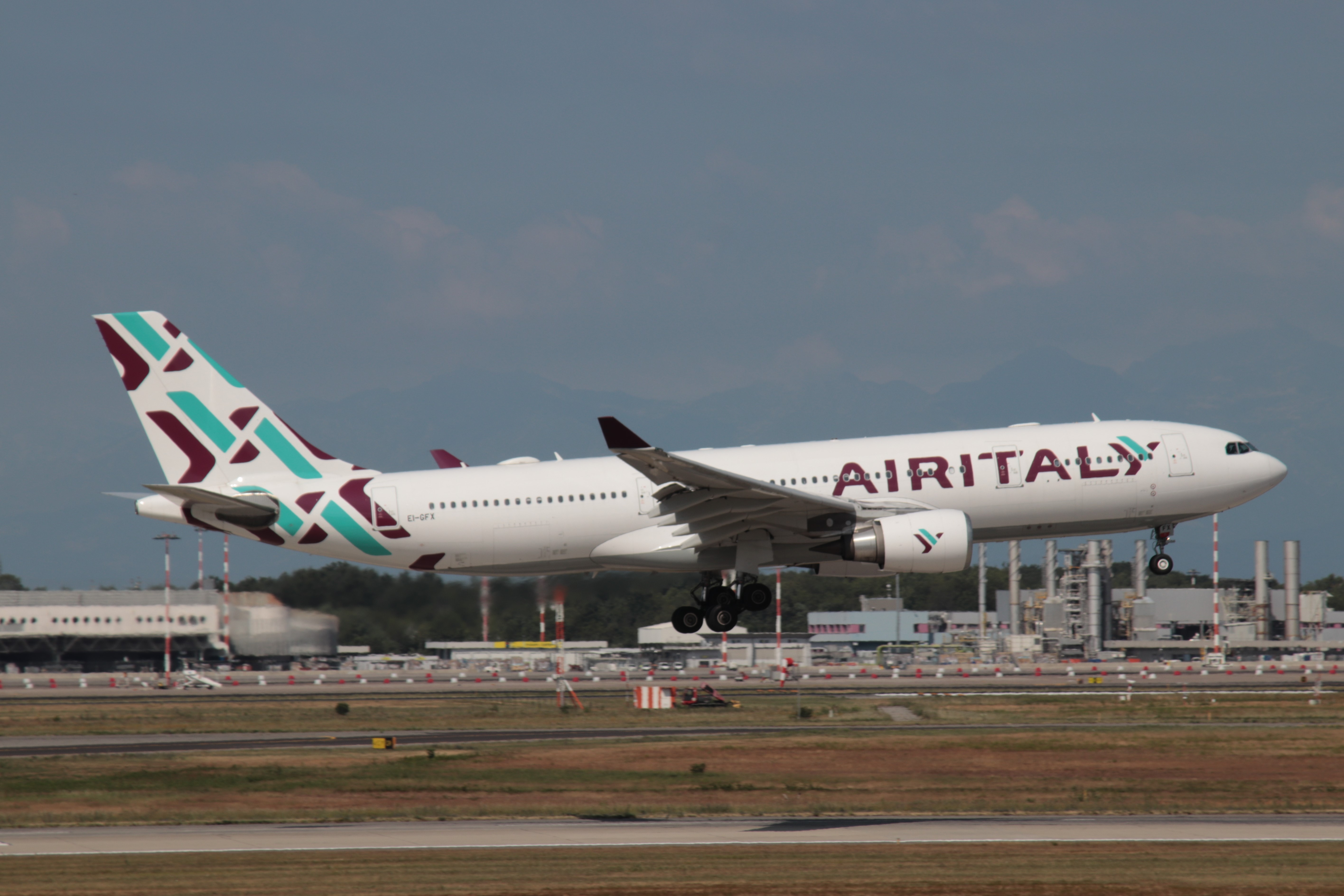 Un A330-200 di Air Italy in atterraggio.